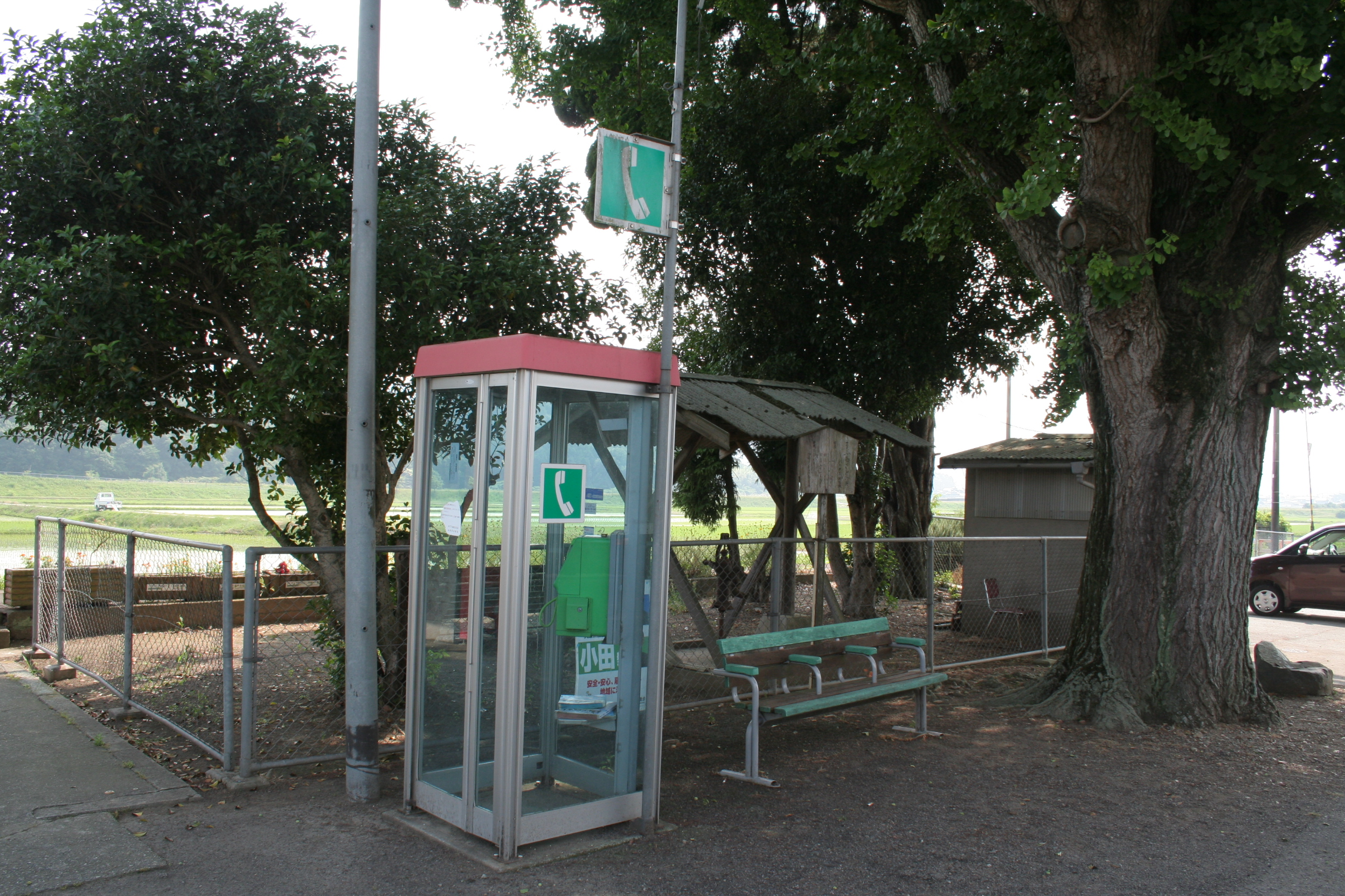 網引駅は兵庫県加西市にある北条鉄道北条線の鉄道駅の一つ。網引駅とその周辺の風景。 駅の出入り口のそばにある電話ボックスとベンチ。